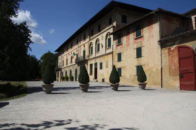 Villa Poggi Banchieri a Castelmartini